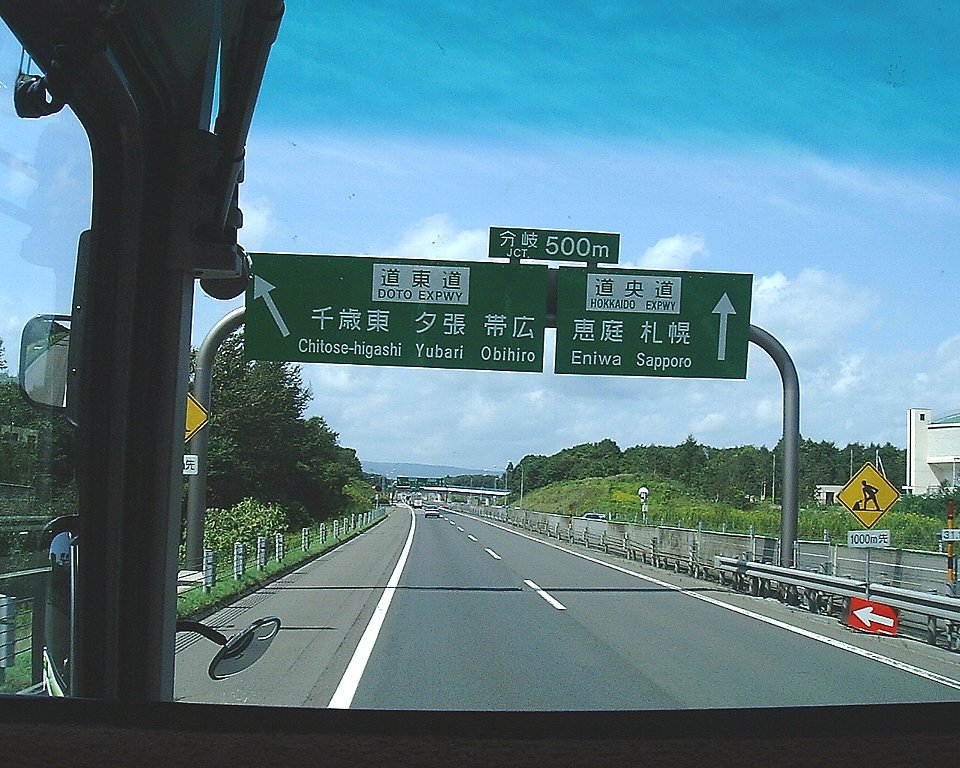 道央自動車道 千歳恵庭JCT南方 新千歳空港→札幌 北都バス車内より